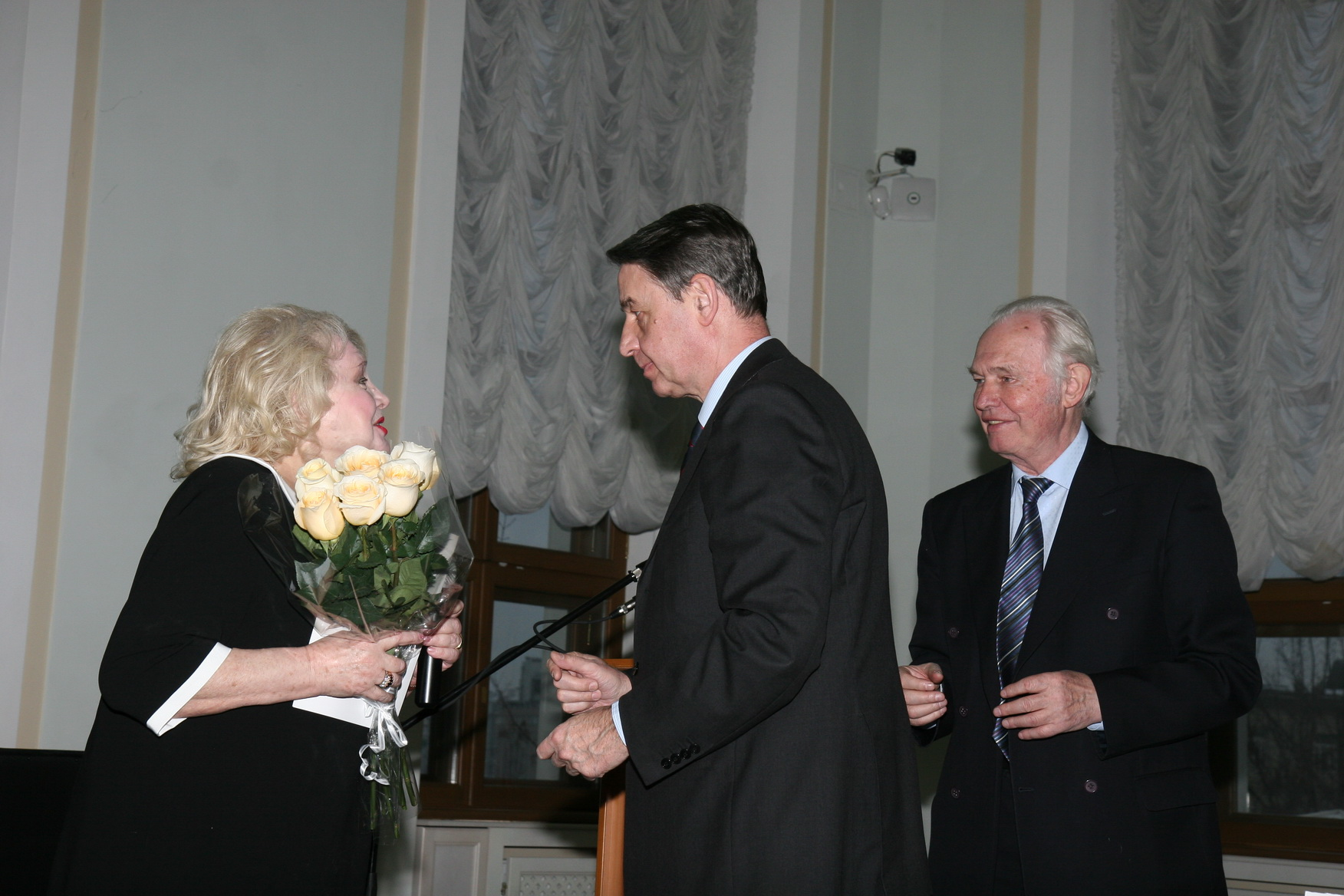 1-го декабря 2011 года в Российской Государственной библиотеке («Дом Пашкова») состоялась торжественная церемония вручения Большой литературной премии России за 2011 год